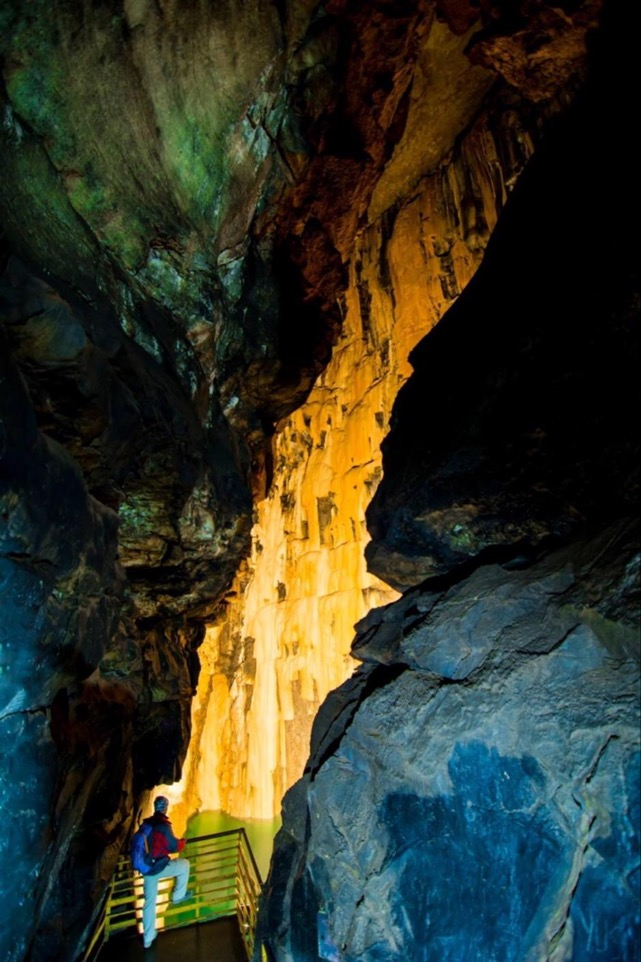 gölet